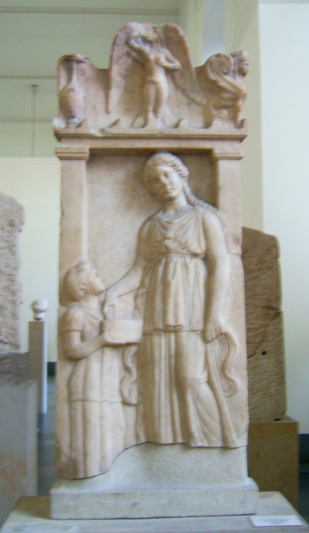 Grabrelief der Silenis, attische Grabstele aus pentelischem Marmor, Mitte des 4. Jahrhunderts v. Chr., gefunden in Attika, 1898 im Kunsthandel für Berlin erworben, Höhe 110 cm, Breite 50 cm, Sk 1492 (K 40)